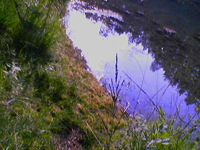 (Drosera rotundifolia L.) in Zabnik Valley